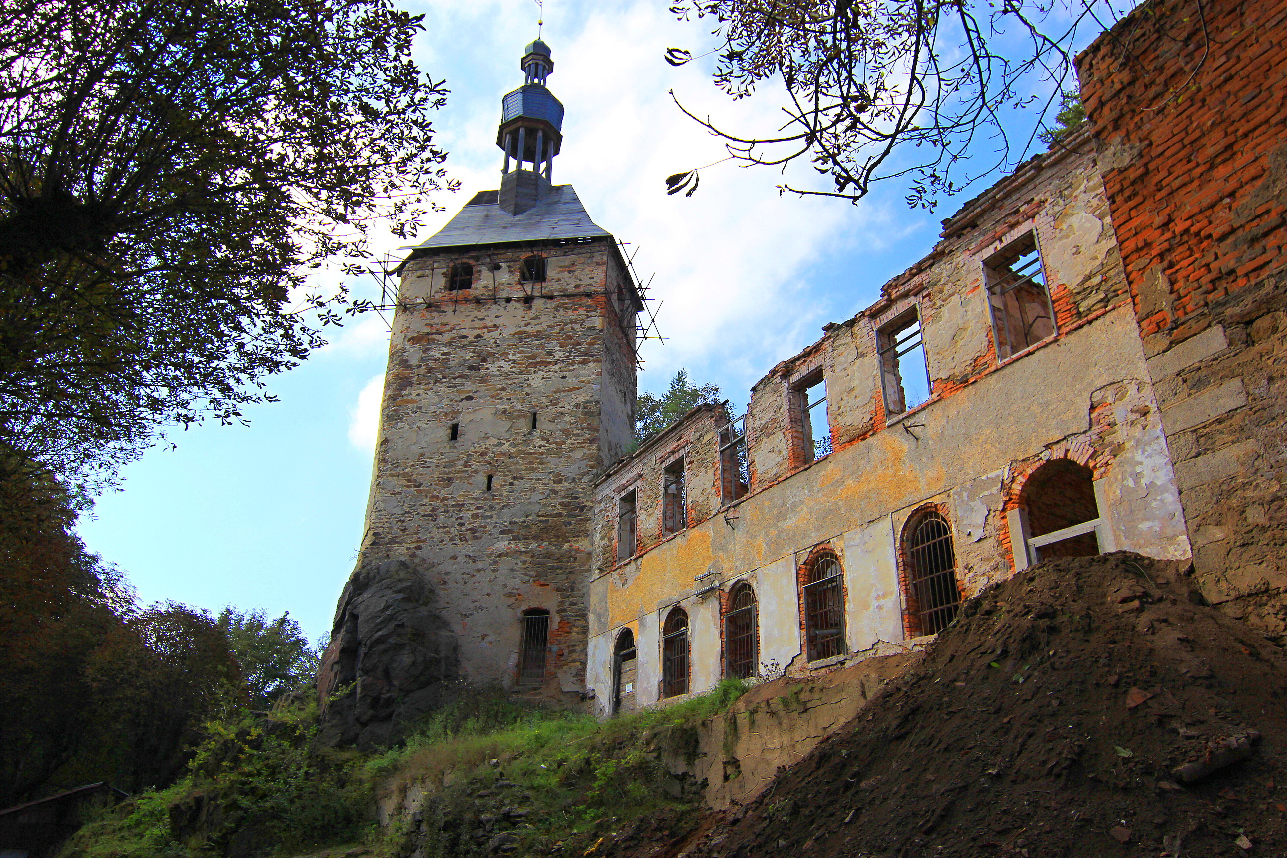 Hrad a zámek Hartenberg, Hřebeny 1, Hřebeny (Josefov).